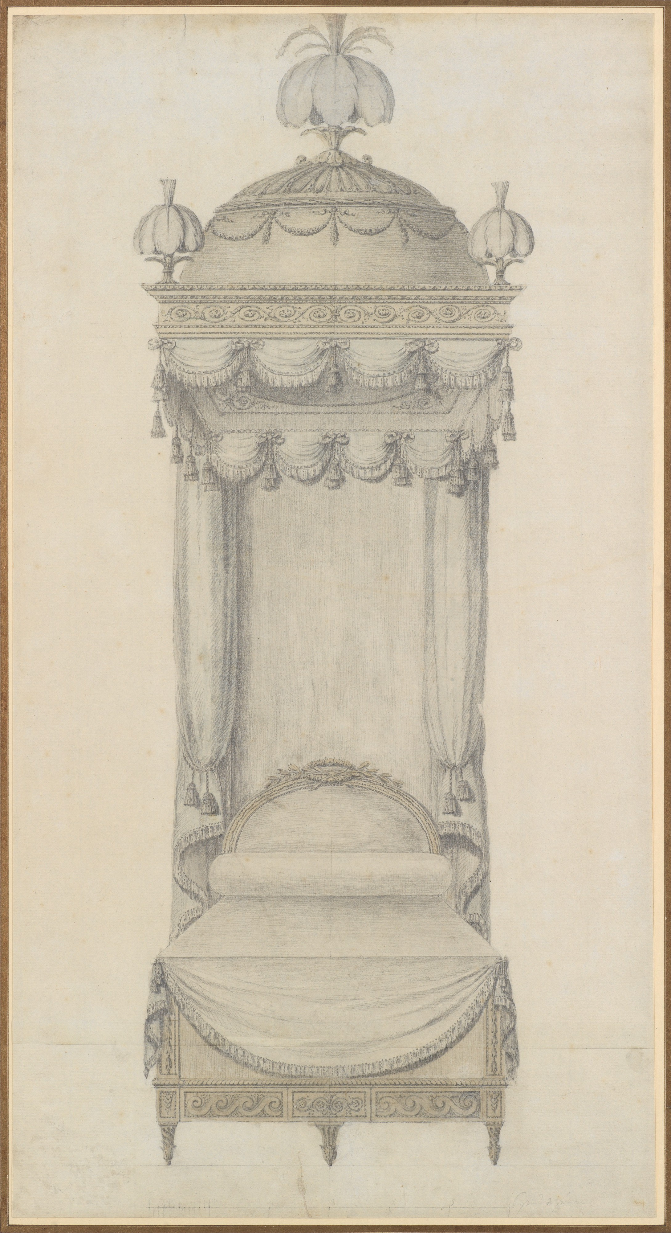 Drawing; Drawings